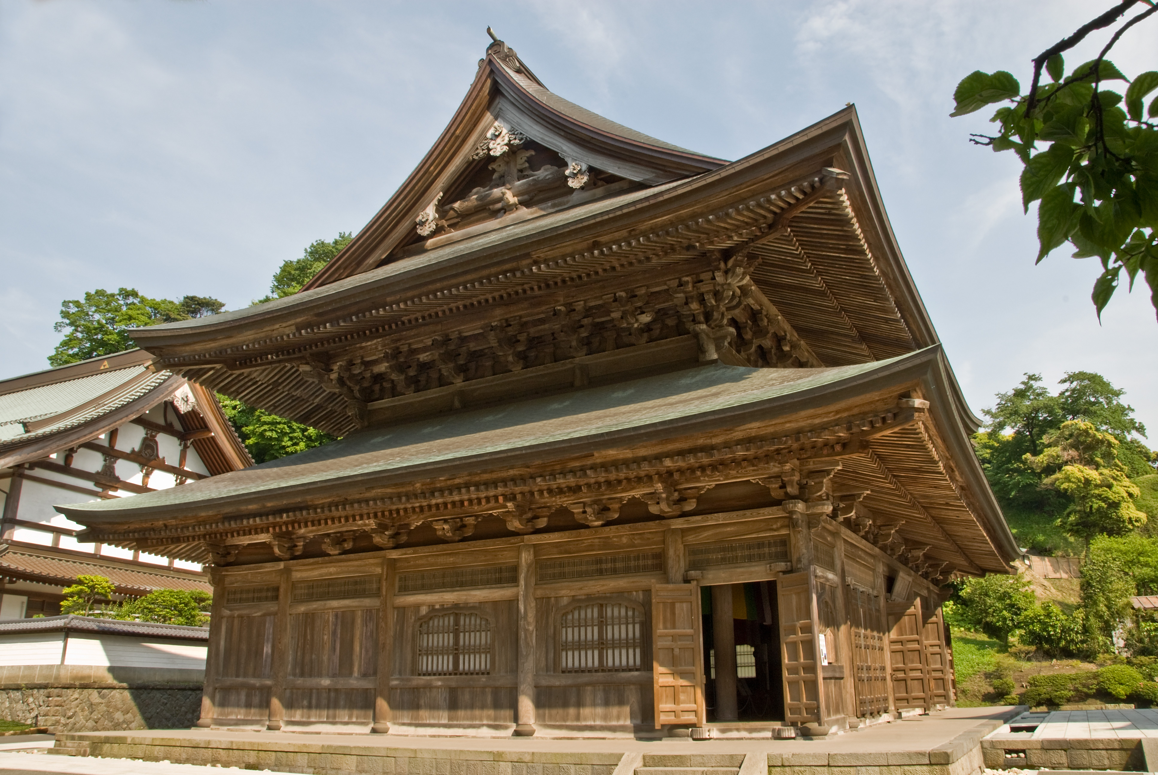 Hattô, Kenchô-ji, Kamakura